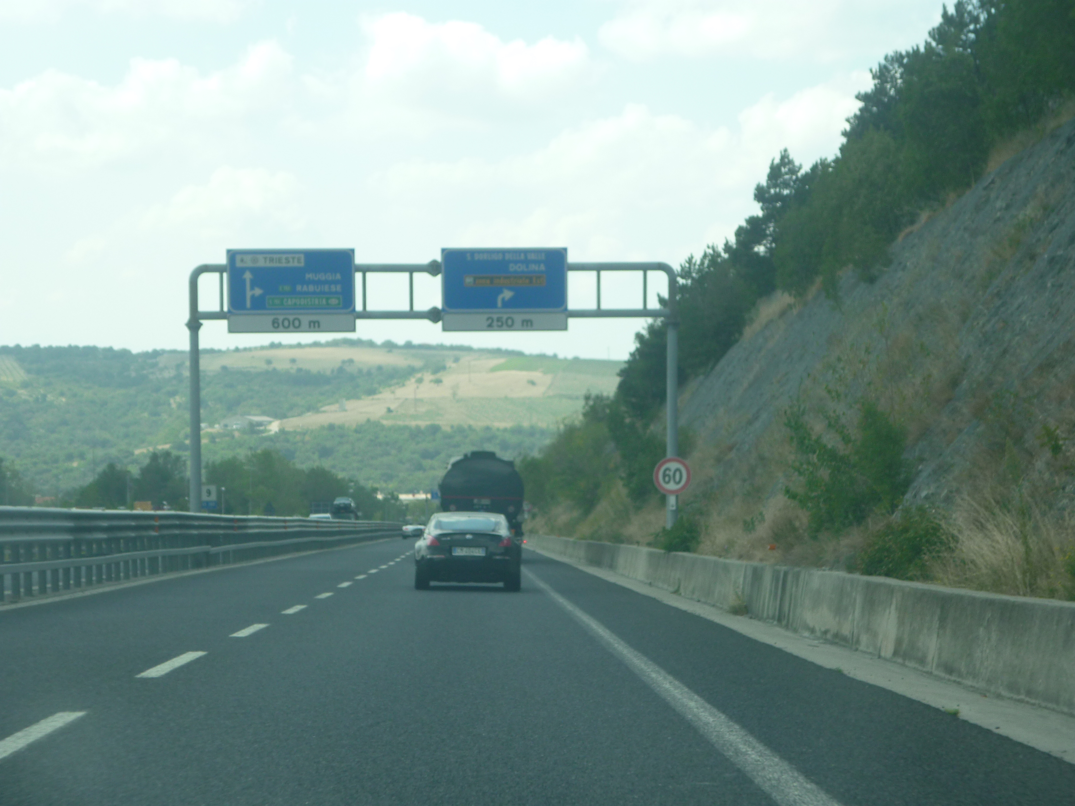 Vista dela strada statale 202 "Triestina" presso il chilometro 9, in direzione Trieste (nel territorio comunale di San Dorligo della Valle).